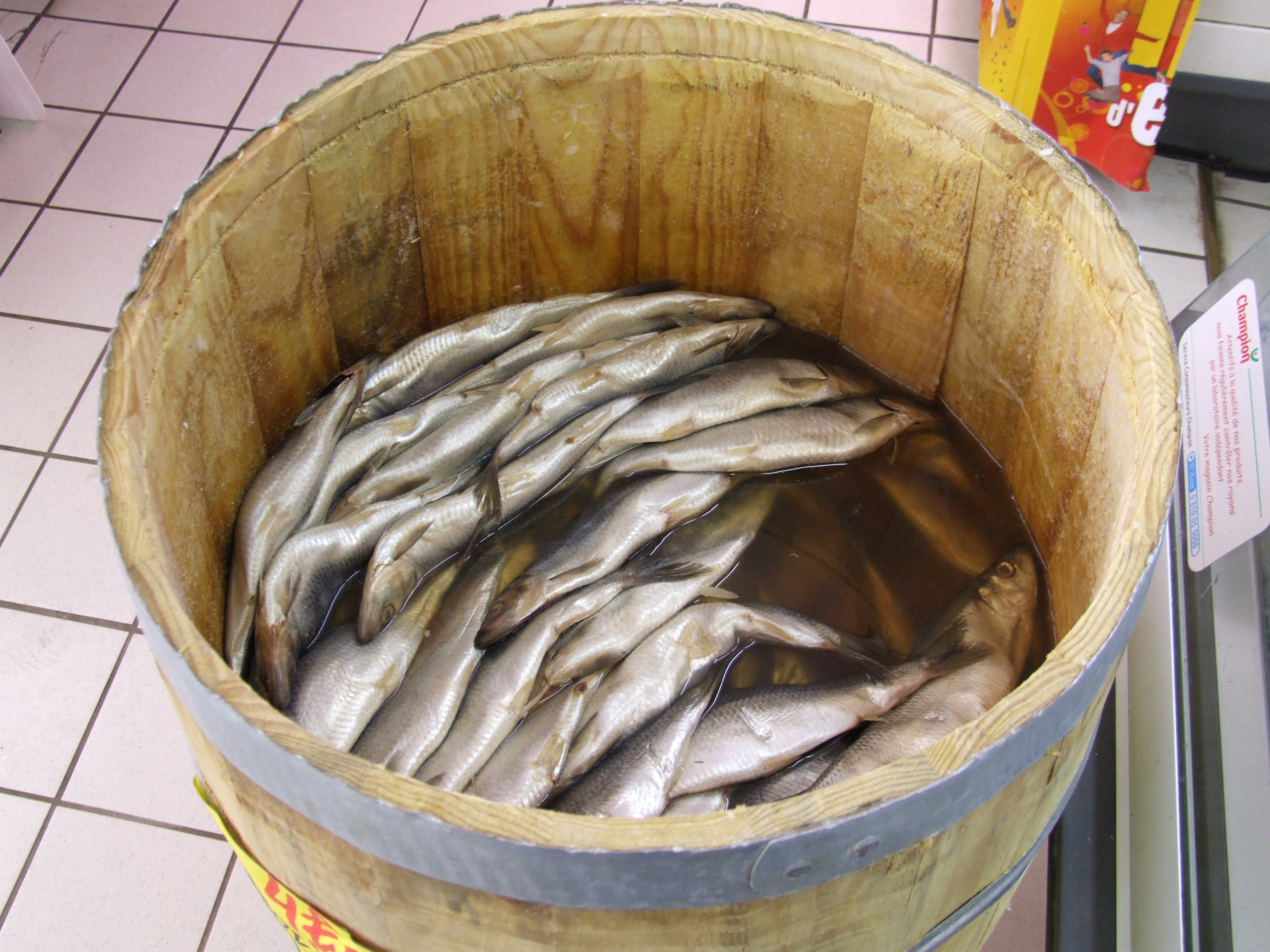 Heringsfass aufgenommen in einem Supermarkt im Elsass 2007, Clupea harengus